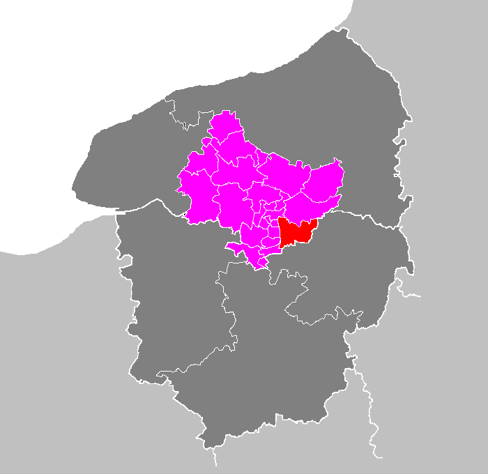 Maps of arrondissements and cantons of France: Arrondissement de Rouen - Canton de Boos.PNG